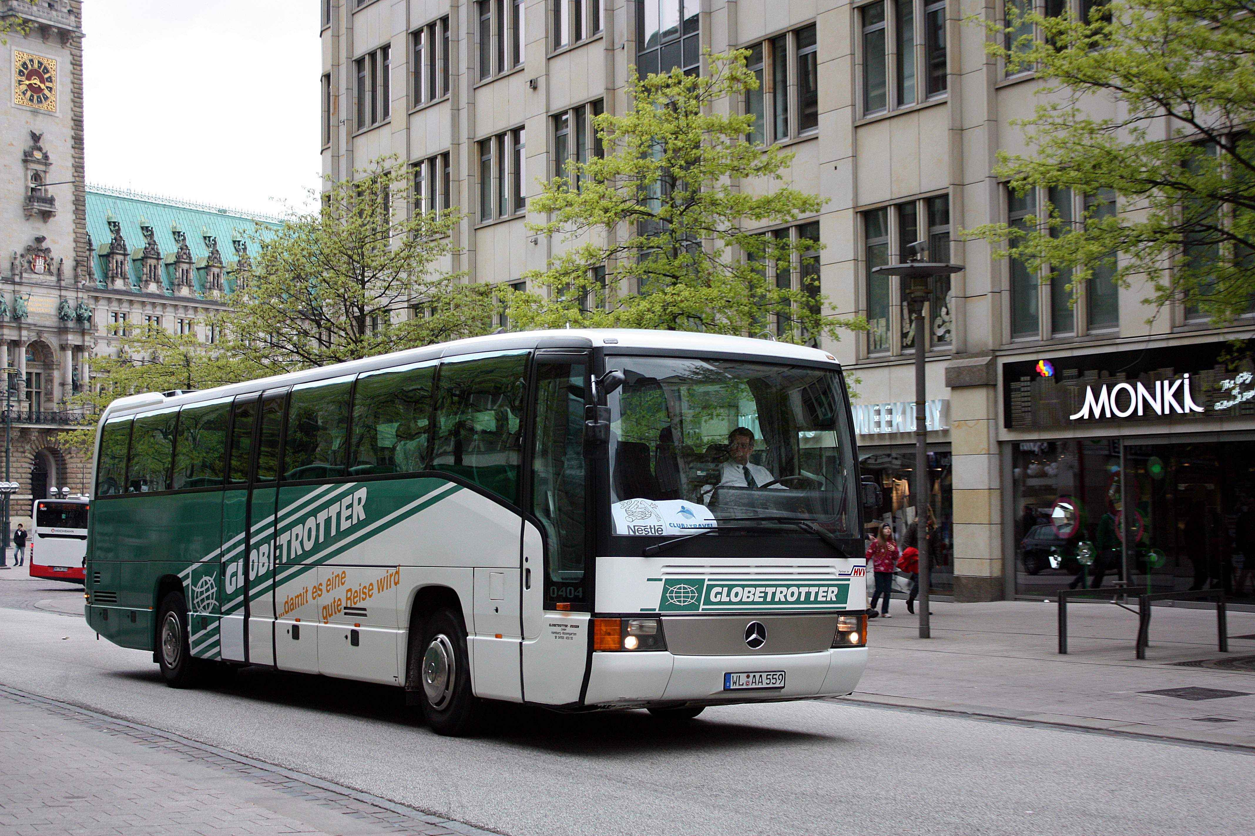 Globetrotter Reisen, Rosengarten - WL AA 559 - Mercedes-Benz O 404 RH-K - Hamburg, Rathausmarkt